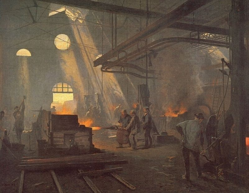 A Forge